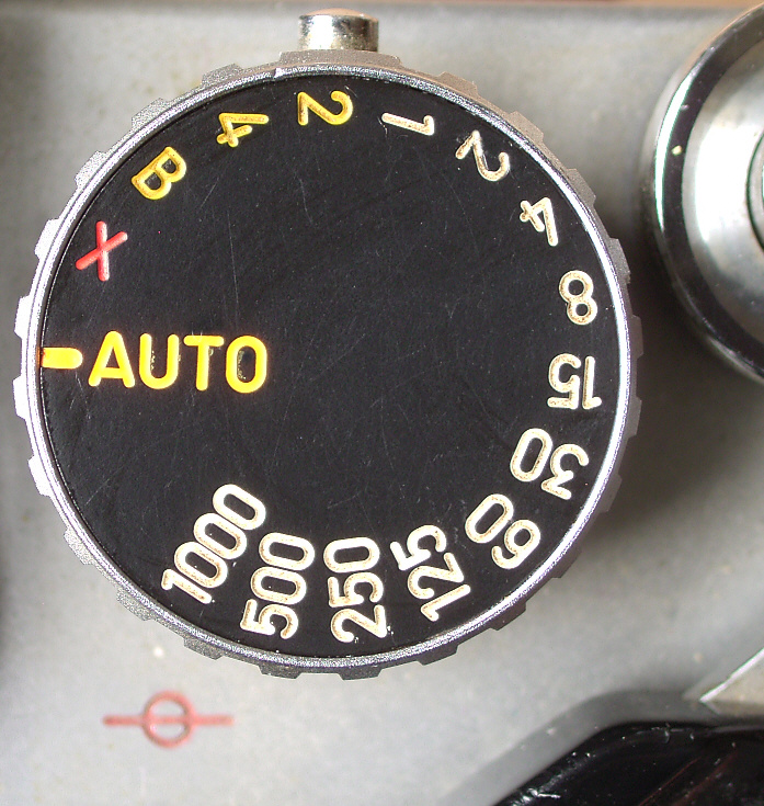 Einstellrad für die Verschlusszeiten einer Minolta XE-5. Zeiten von 1/1000s bis 1 s weiß, zwei und vier Sekunden bzw. Einstellung für Zeitautomatik und B gelb. Kürzeste Blitz-Synchronzeit 1/90s (X-Kontakt), die bei dieser Kamera wie die Einstellung B auch ohne Batterien funktioniert, separat einstellbar (rot).